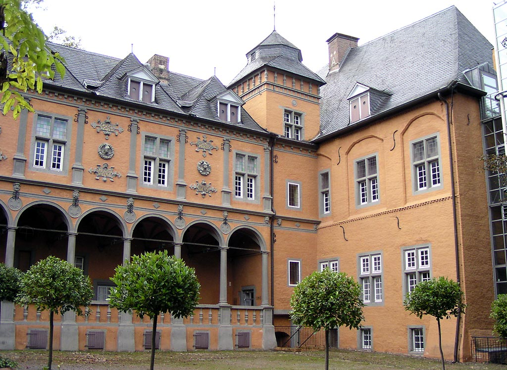 Schloss Rheydt, Herrenhaus (Original text : Die Nordseite des Herrenhauses von Schloss Rheydt am 3. Oktober 2004.